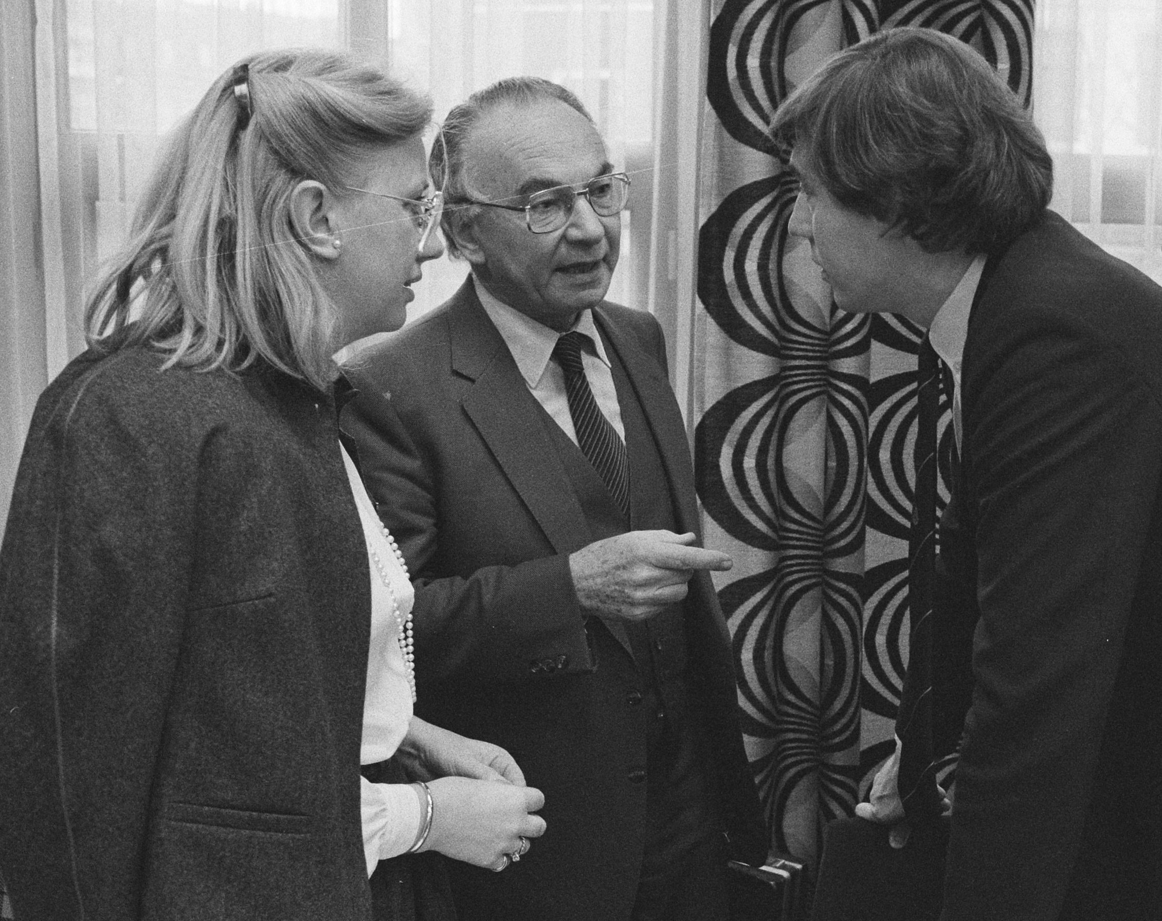 Collectie / Archief : Fotocollectie Anefo Reportage / Serie : [ onbekend ] Beschrijving : Hoorzitting m.b.t. weigering "duikbotenexport" naar Taiwan; Sari van Heemskerck (VVD), J. J. van Wessen (bewindvoerder RSV), Nijpels (VVD) Datum : 23 december 1983 Locatie : Den Haag, Zuid-Holland Trefwoorden : hoorzittingen Persoonsnaam : Heemskerck, Sari van, J. J. van Wessen, Nijpels, Ed Fotograaf : Antonisse, Marcel / Anefo Auteursrechthebbende : Nationaal Archief Materiaalsoort : Negatief (zwart/wit) Nummer archiefinventaris : bekijk toegang 2.24.01.05 Bestanddeelnummer : 932-8187